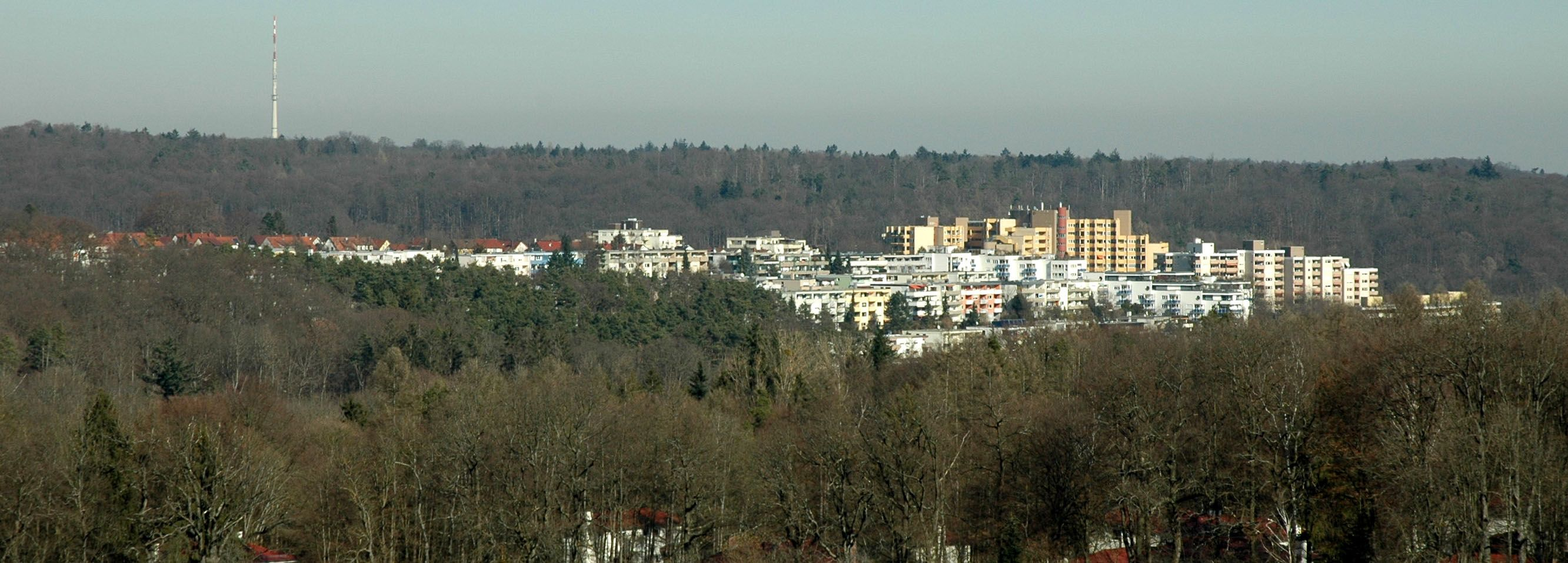 Blick auf Stuttgart-Hoffeld von Südwesten